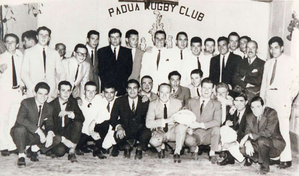 Padua Rugby Club, 1957.